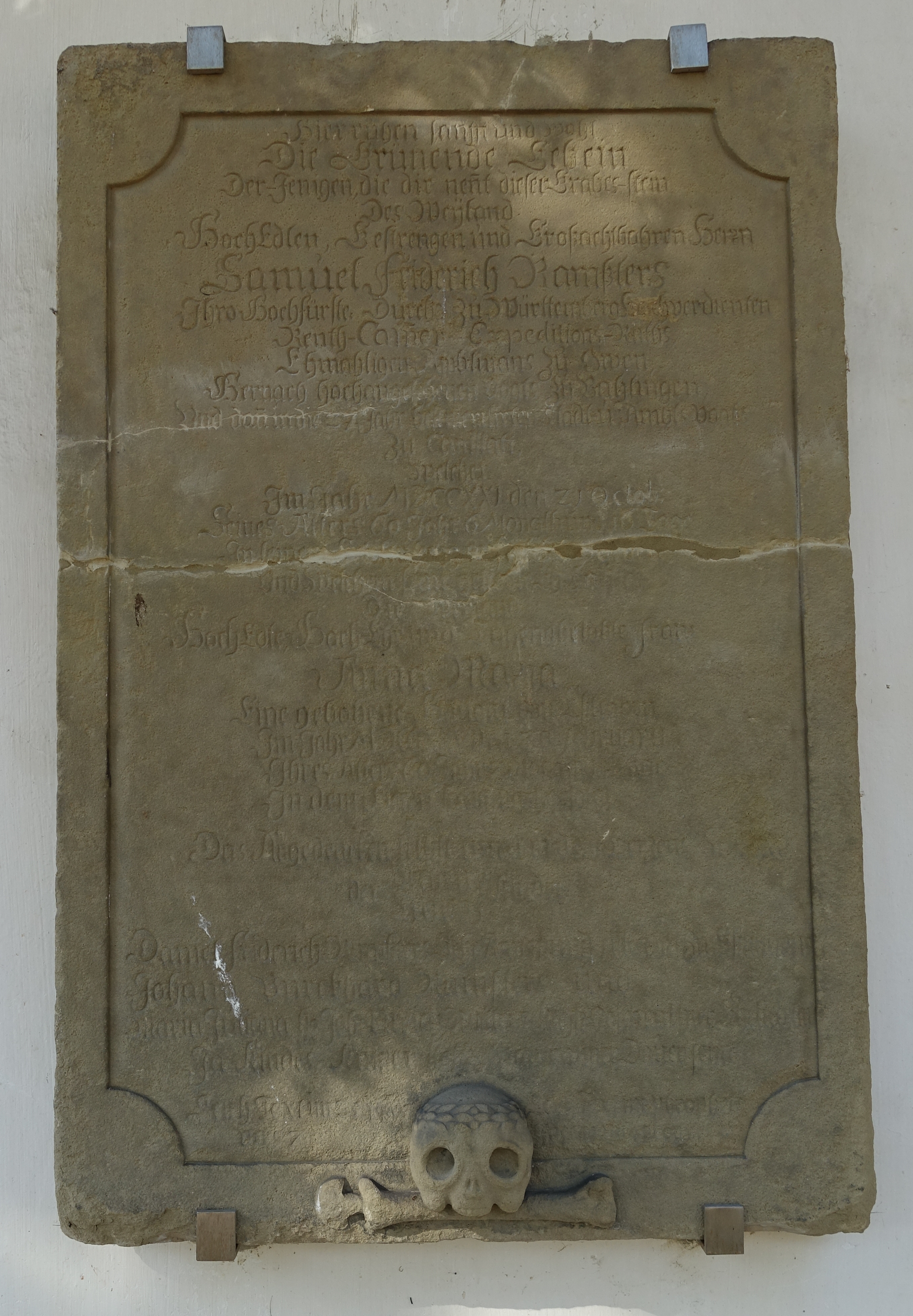 Epitaph an der Südseite der Uffkirche auf dem Uff-Kirchhof in Stuttgart-Bad Cannstatt für den Cannstatter Vogt Samuel Friedrich Ramsler (Ramßler) (1661–1721).